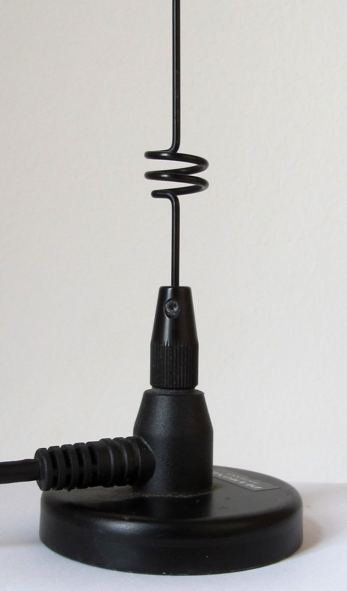 Verlängerungsspule am Fusspunkt einer Monopolantenne für 70cm Band (λ/2) und 2m Band (λ/4)